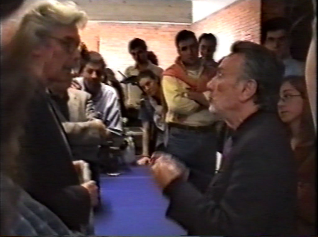 Francesco Gostoli con Giancarlo De Carlo